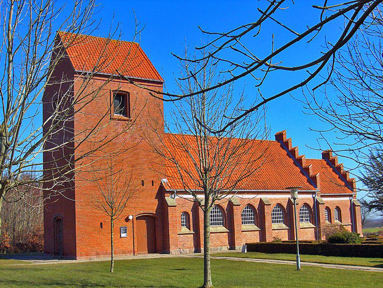 fra sydvest